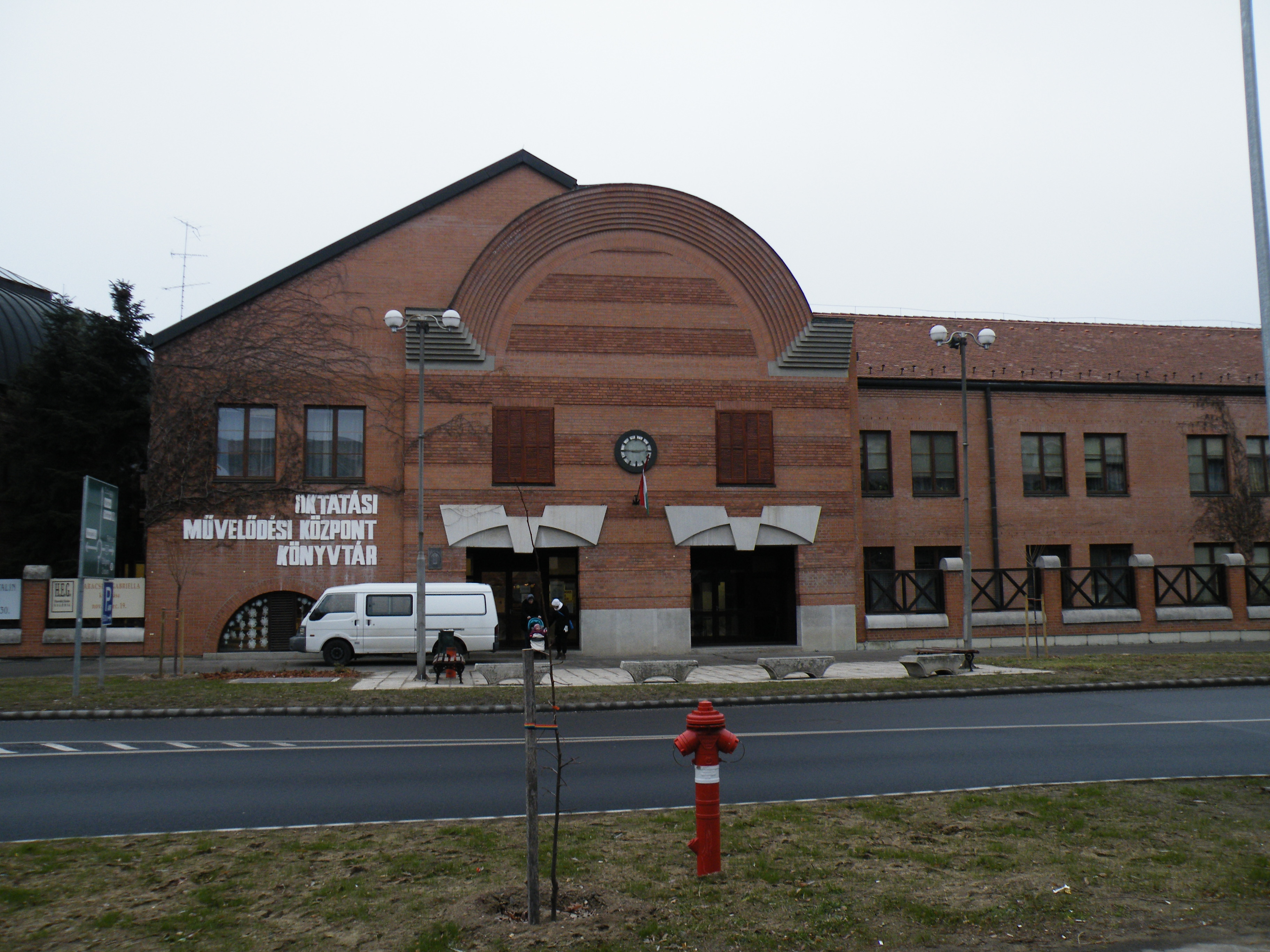 A balassagyarmati Mikszáth Kálmán Művelődési Központ épülete